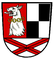 Die Gemeinde Polsingen besteht seit 1978 aus den ehemals selbstständigen Gemeinden Döckingen, Polsingen, Ursheim und Trendel. Das Wappen geht auf die Geschichte der vier Orte ein. Das Andreaskreuz ist dem Wappen von Trendel entnommen und erinnert an die Grafen von Oettingen. Sie hatten die Dorfherrschaft in Trendel inne. Der Hundekopf kommt aus dem Wappen der Herren von See, die von 1100 bis 1518 in Polsingen nachweisbar sind. Die Vierung von Silber und Schwarz weist auf die Markgrafen von Brandenburg-Ansbach hin, die 1517 einen Großteil der Güter der Herren von See erwarben. Sie waren auch der größte Grund- und Gerichtsherr in Döckingen, Polsingen und Ursheim.